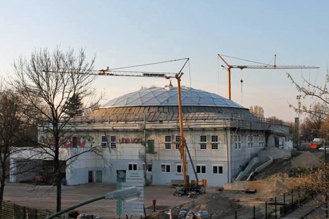 Aktuelle Zustand